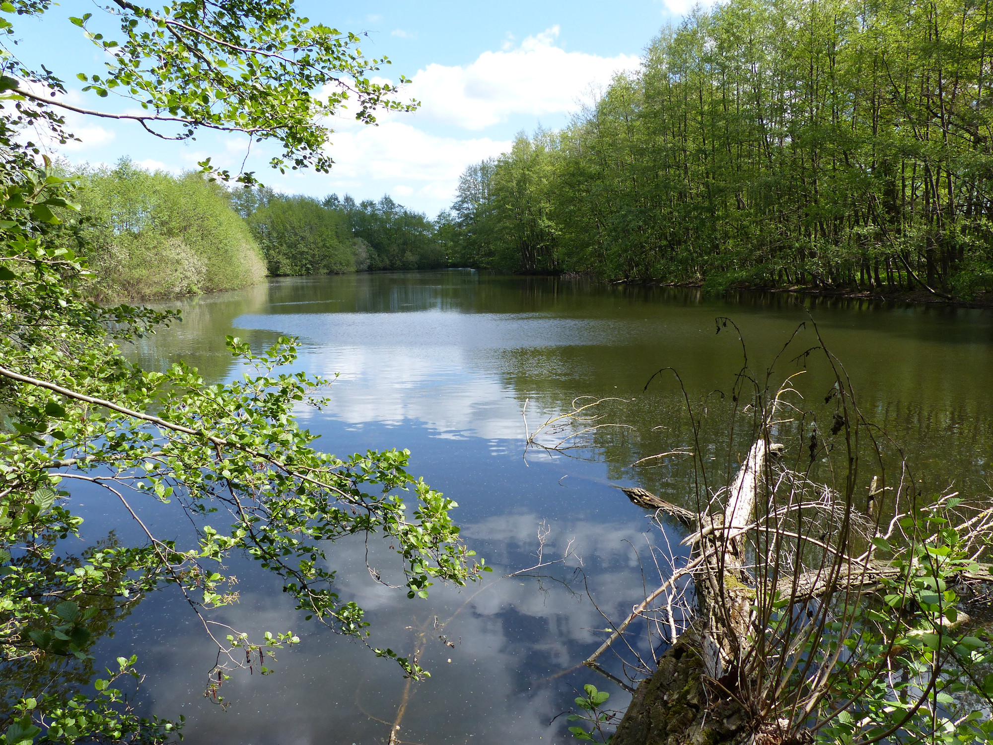 Teich zwischen Reinertsteich und Schapenteich im Naturschutzgebiet Riddagshausen, Blickrichtung Nordosten